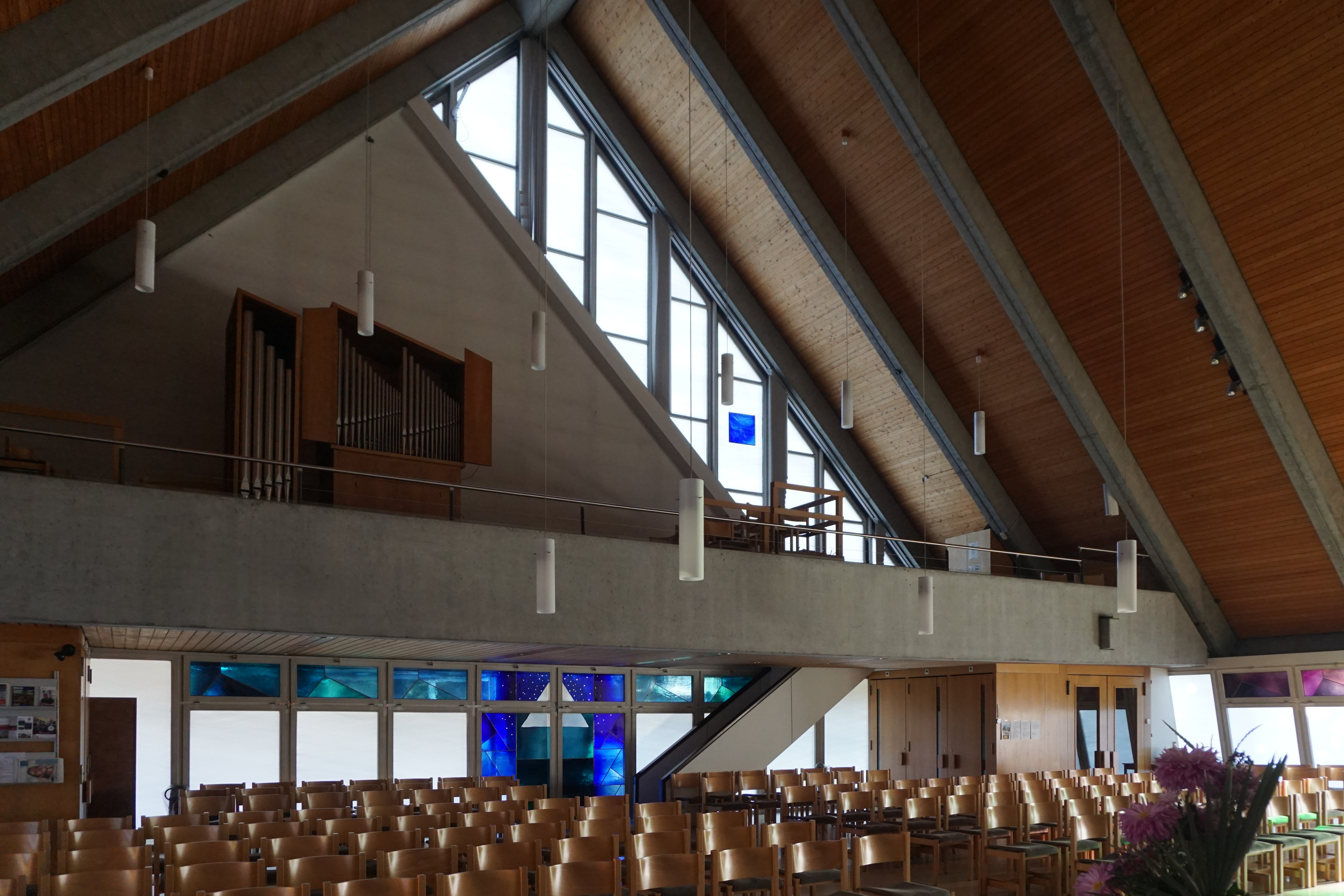 Die Heiliggeist-Kirche von Belp, Empore und Orgel